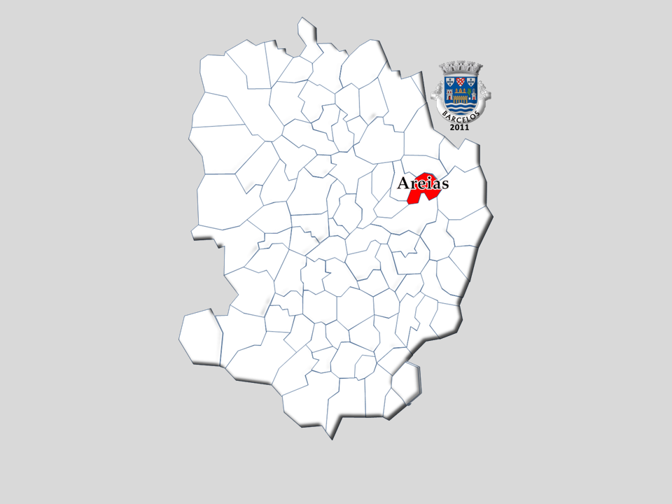 Censos 1864-2011